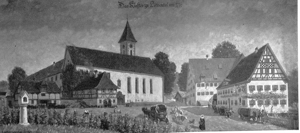 Gemälde aus der Gastwirtschaft Zum „Klosterwirt“, Friedrichshafen